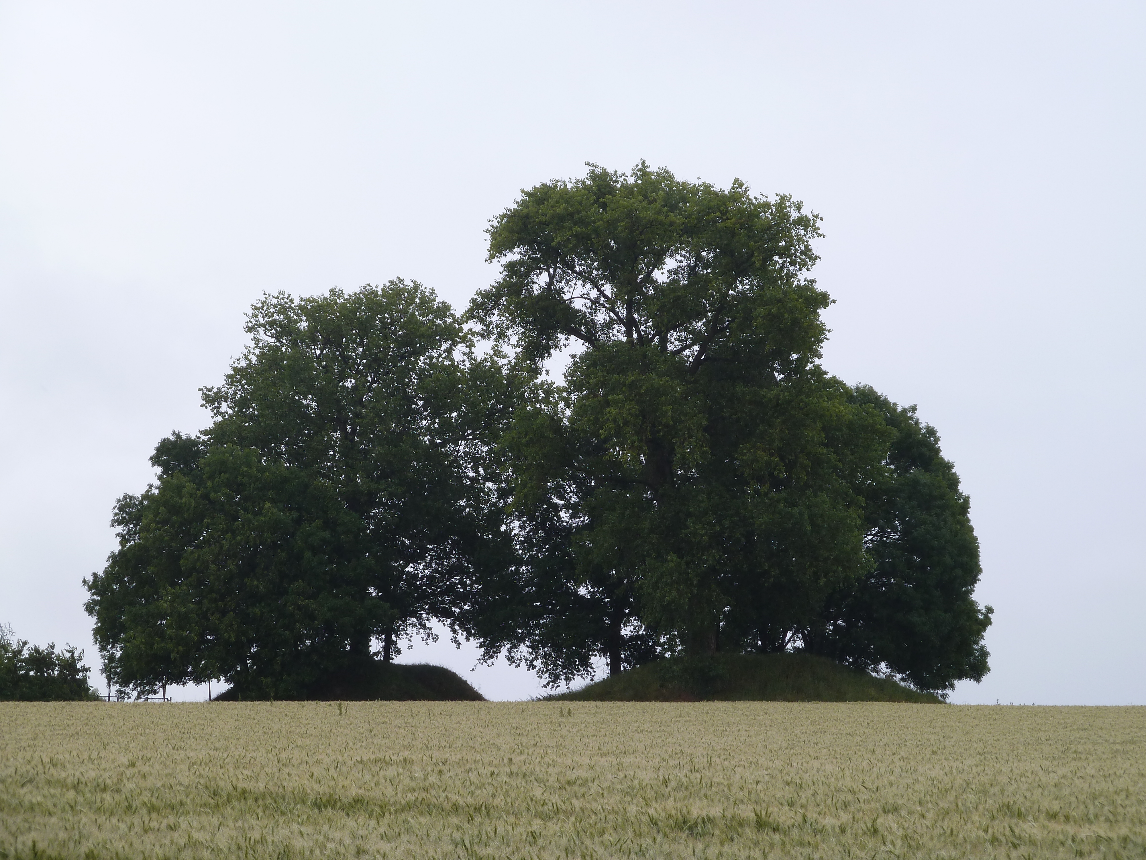 Les Trois Tombes, Gingelom, Belgique